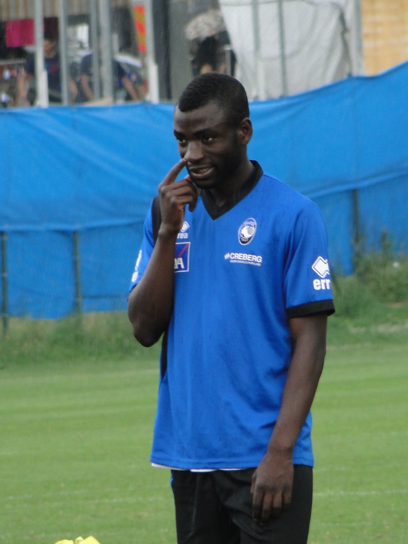 Moussa Kone, calciatore ivoriano